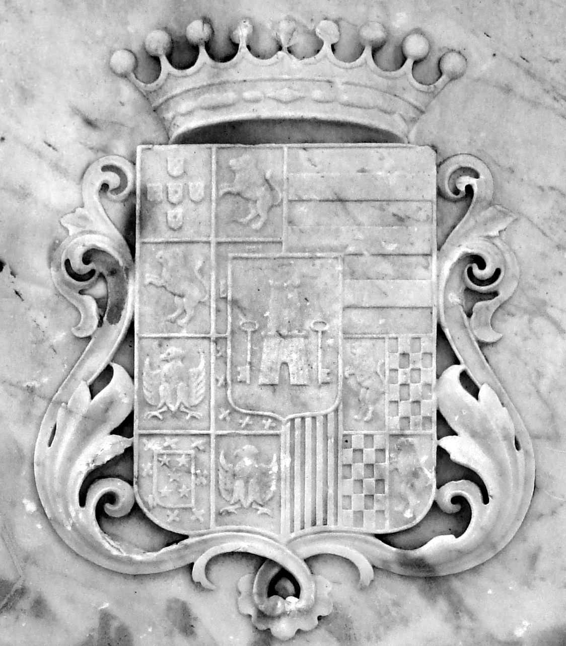 Brasão do Conde de Porto Alegre, Manuel Marques de Sousa. Placa de mármore na base de seu monumento em Porto Alegre.